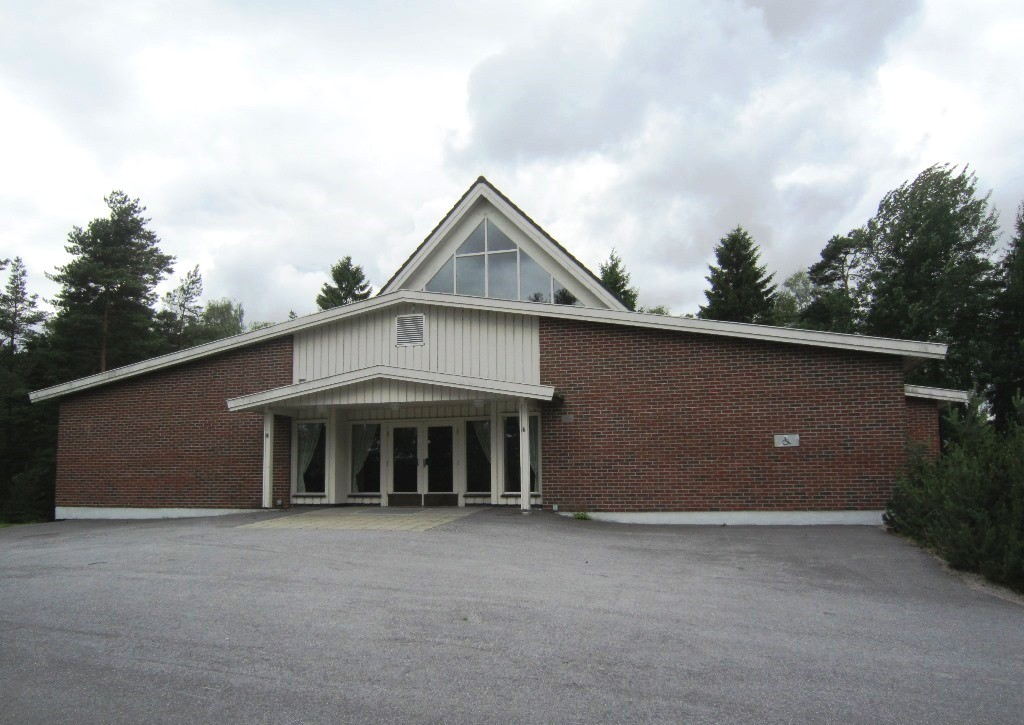 Hafslundsøy kirke (Sarpsborg kommune)